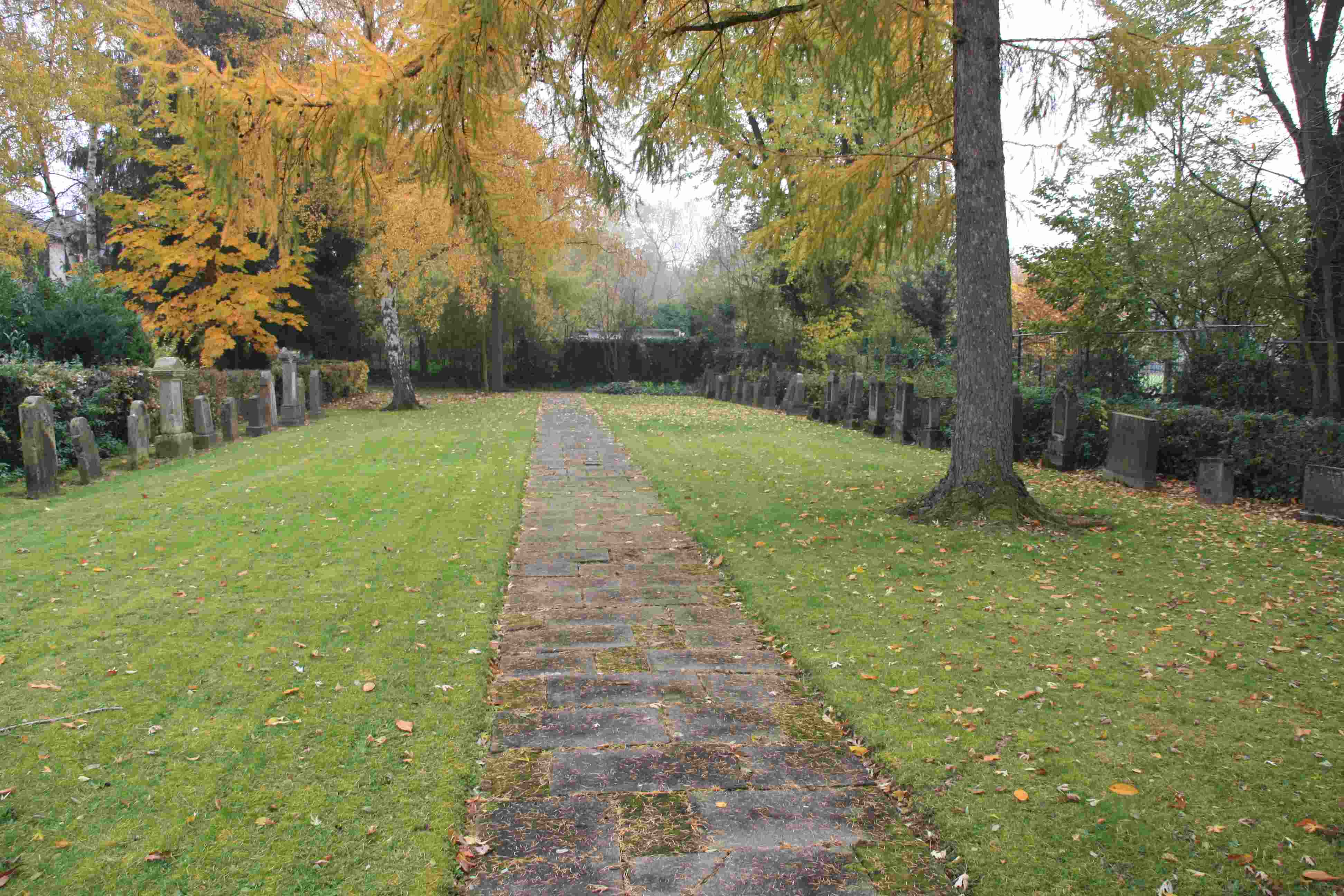 Jüdischer Friedhof Gürzenich 06